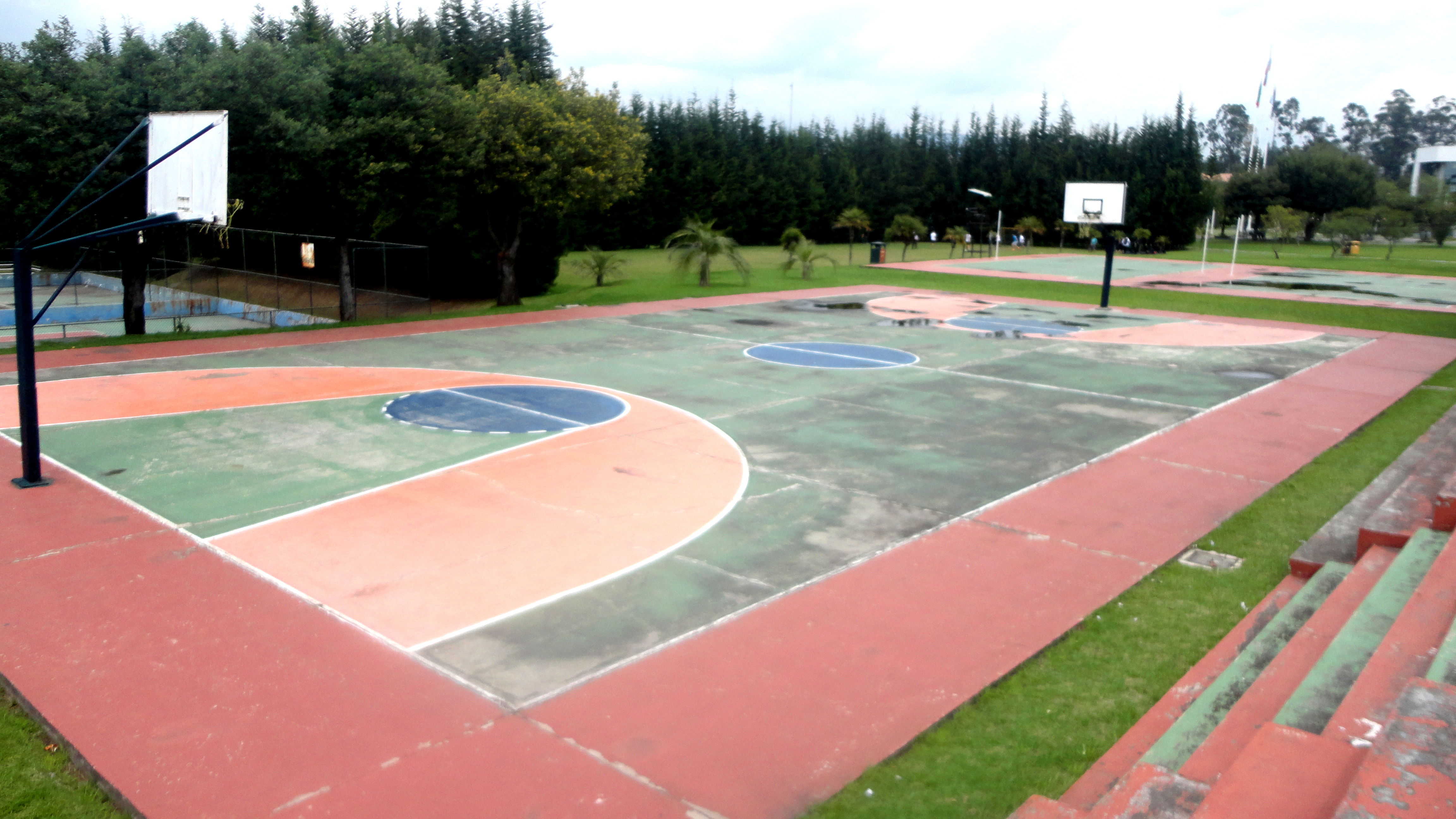 Canchas deportivas de la universidad.